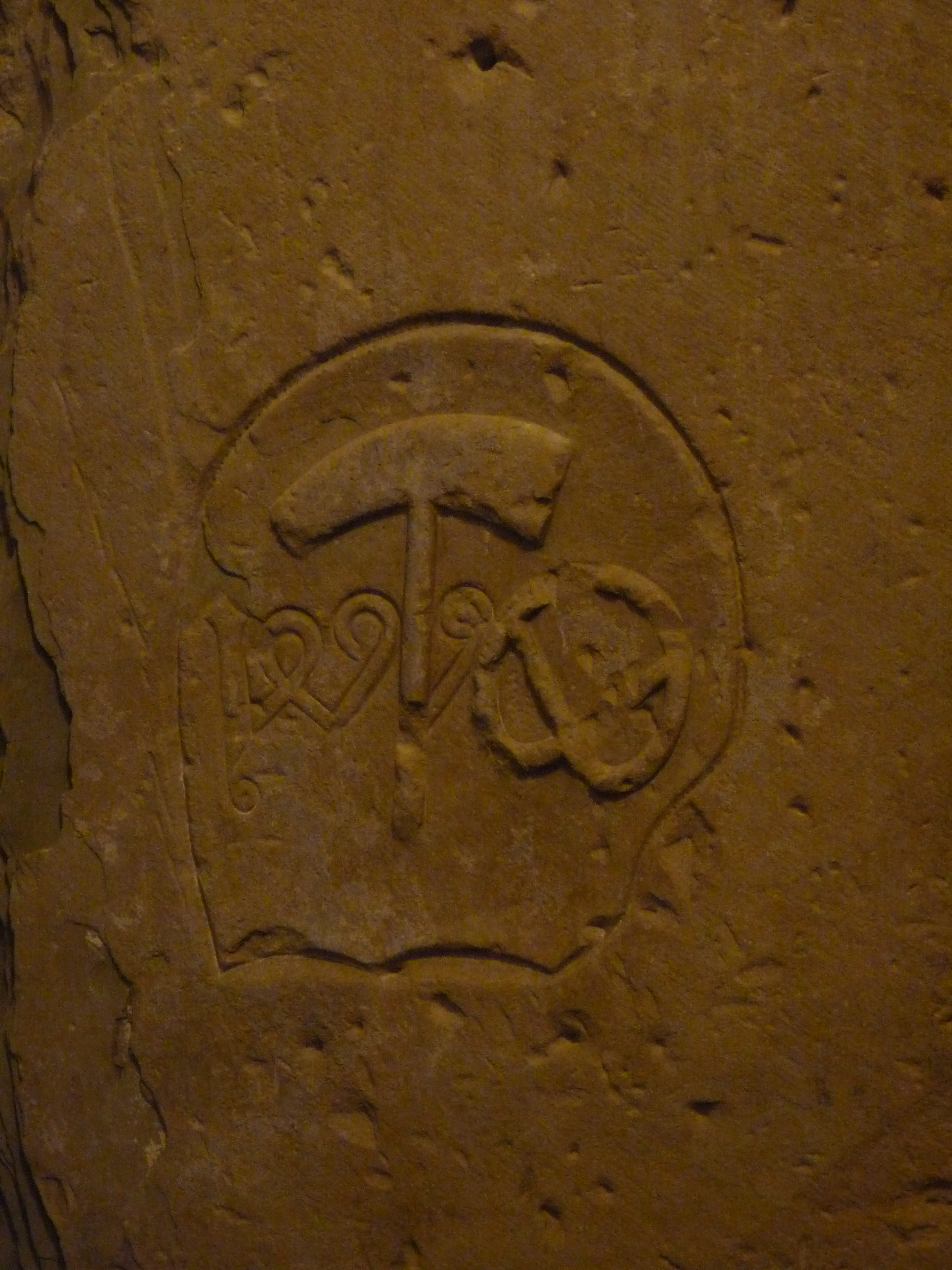 Michaelskirche in Waiblingen, 1496 von Hans Ulmer erbaut Grabmal 1499